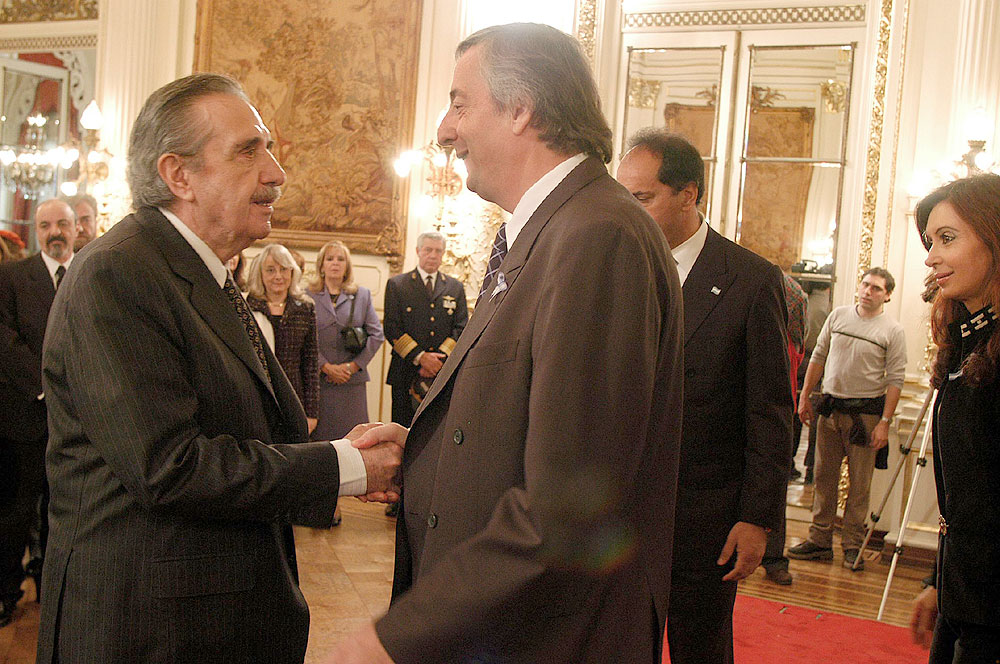 Casa Rosada, Salón Blanco - El presidente Néstor Kirchner junto al ex presidente, Raúl Alfonsín.